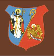 własne